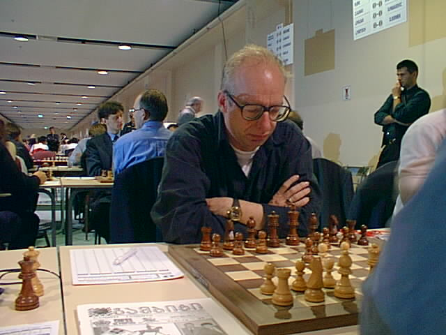 GM Robert Hübner, Istanbul (ol) 2000